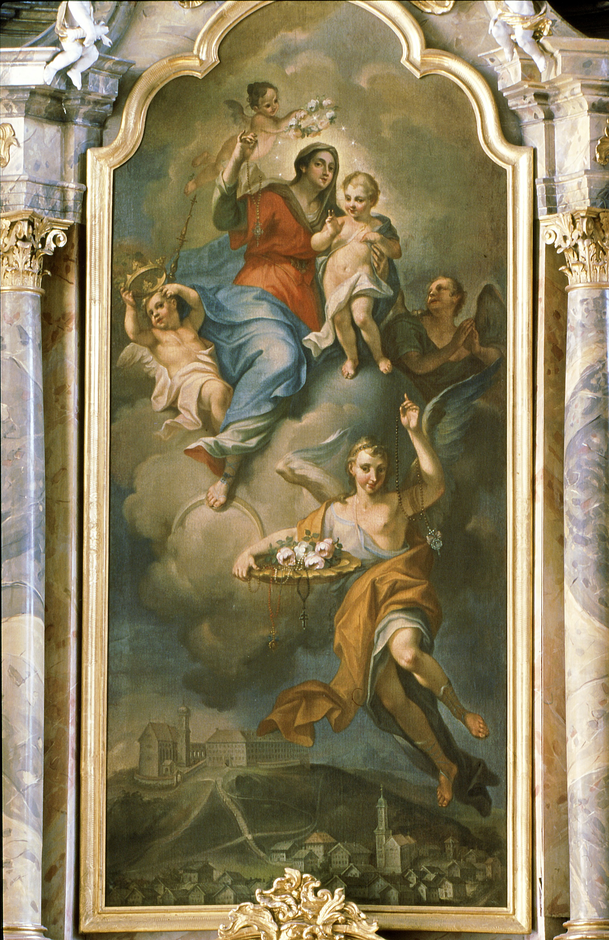 Altarblatt eines Seitenaltares in der Stadtpfarrkirche Marktoberdorf von Johann Georg Wolcker